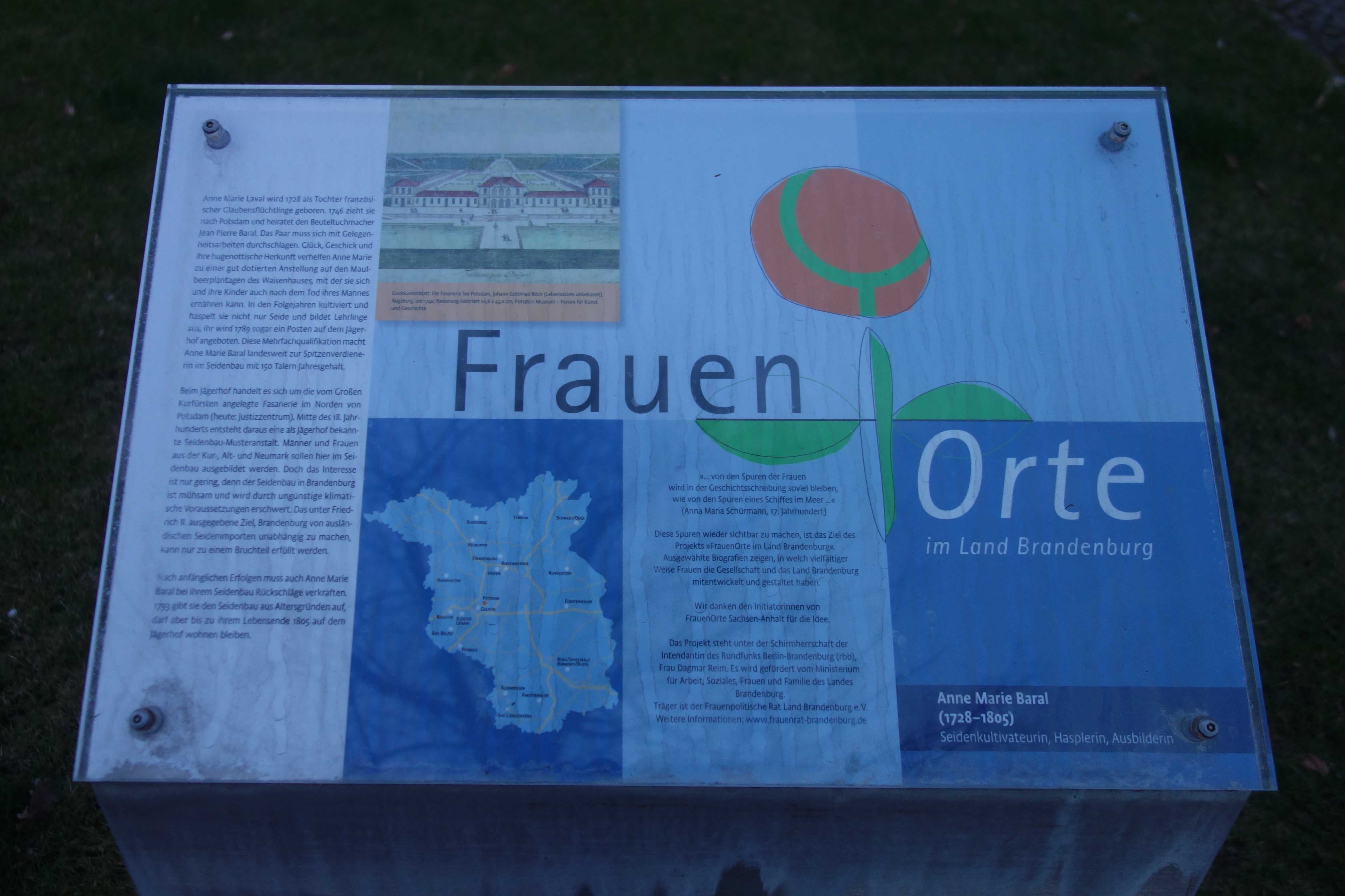 Die Tafel steht vor dem Justizzentrum in Potsdam und wurde am 20. Juni 2012 enthüllt.